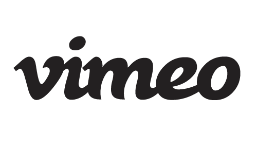 Logotipo de Vimeo